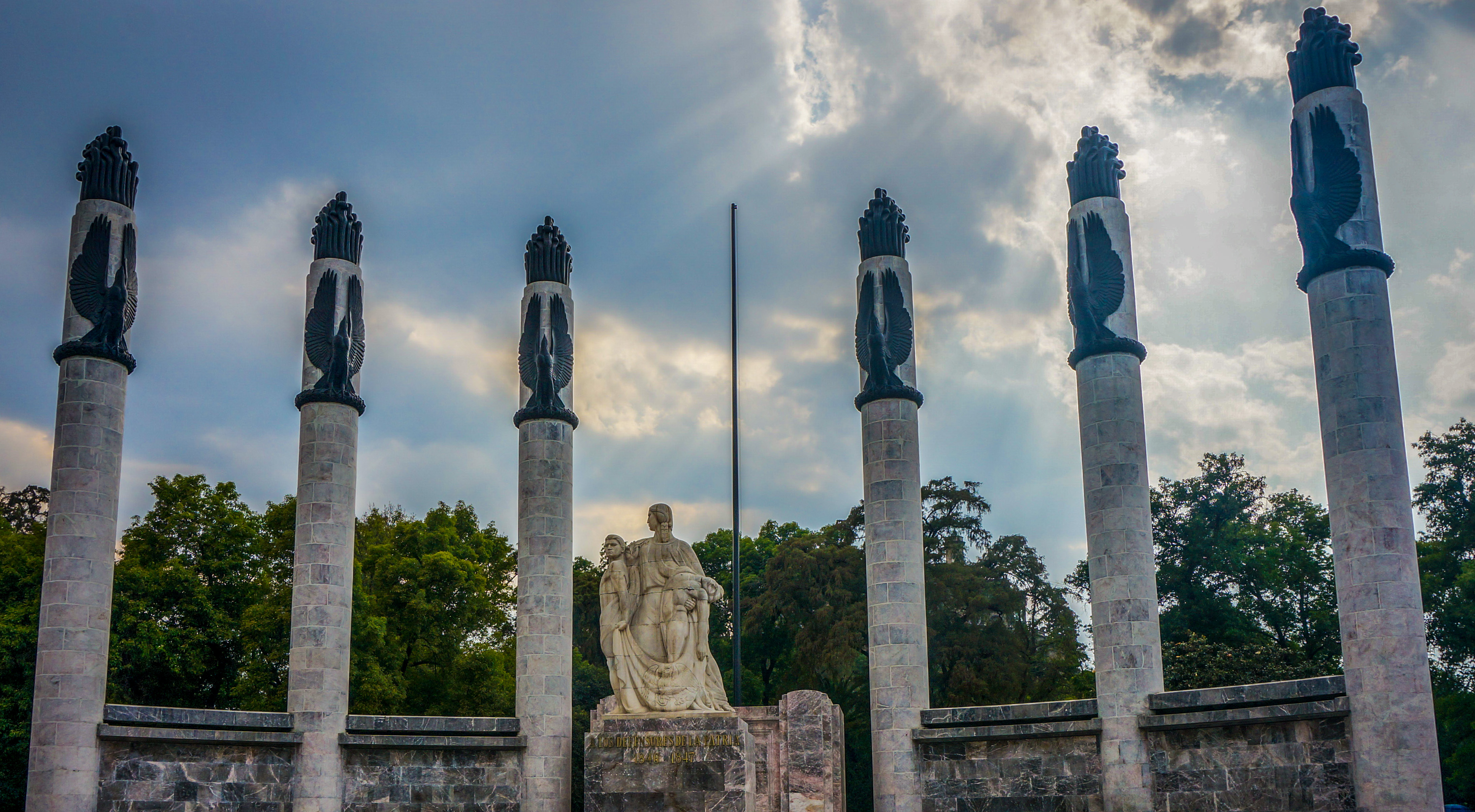 Castillo de Chapultepec